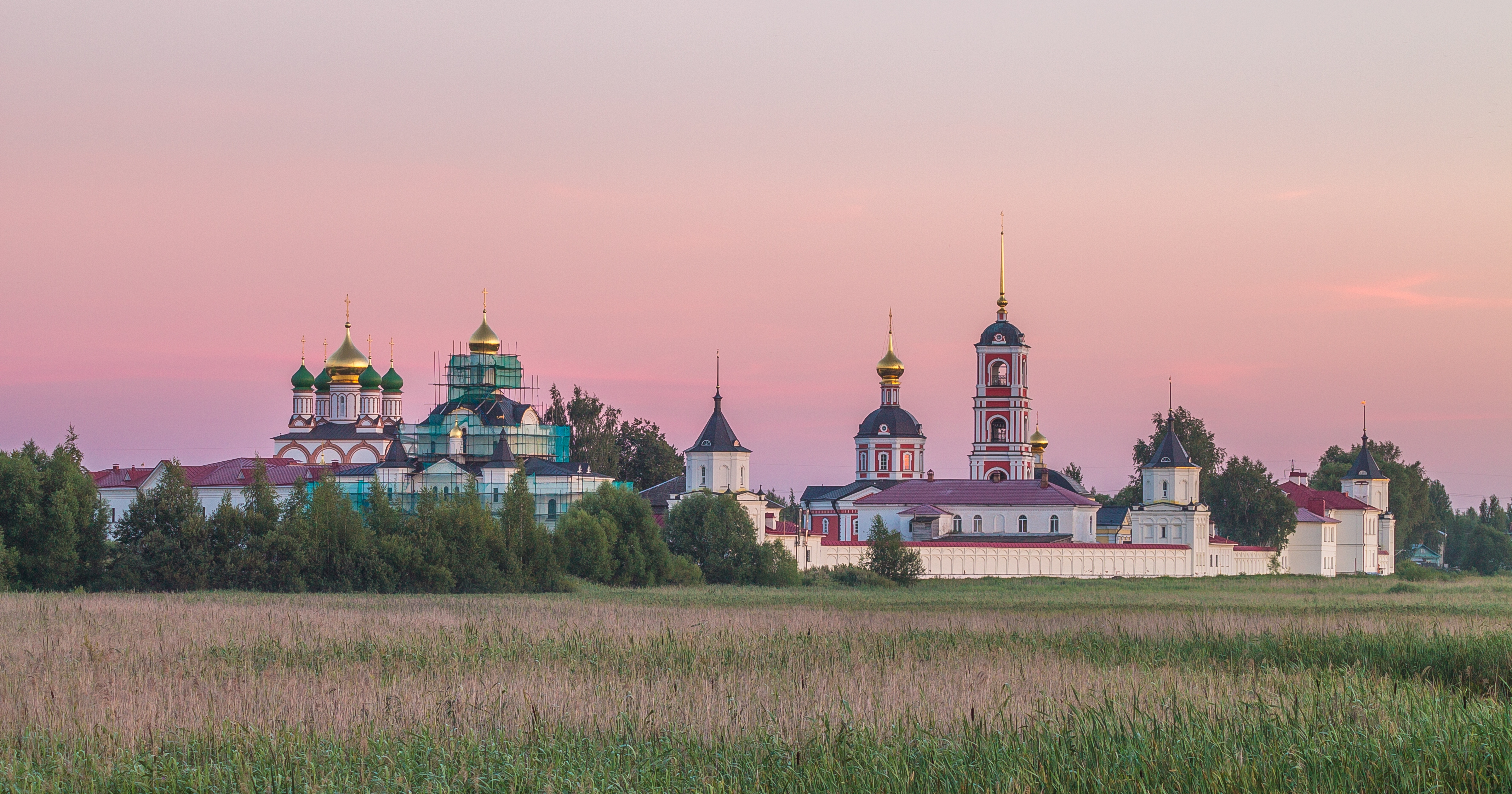 Монастырь Троице-Варницкий: пос. Варницы, Ростов, Ярославская область